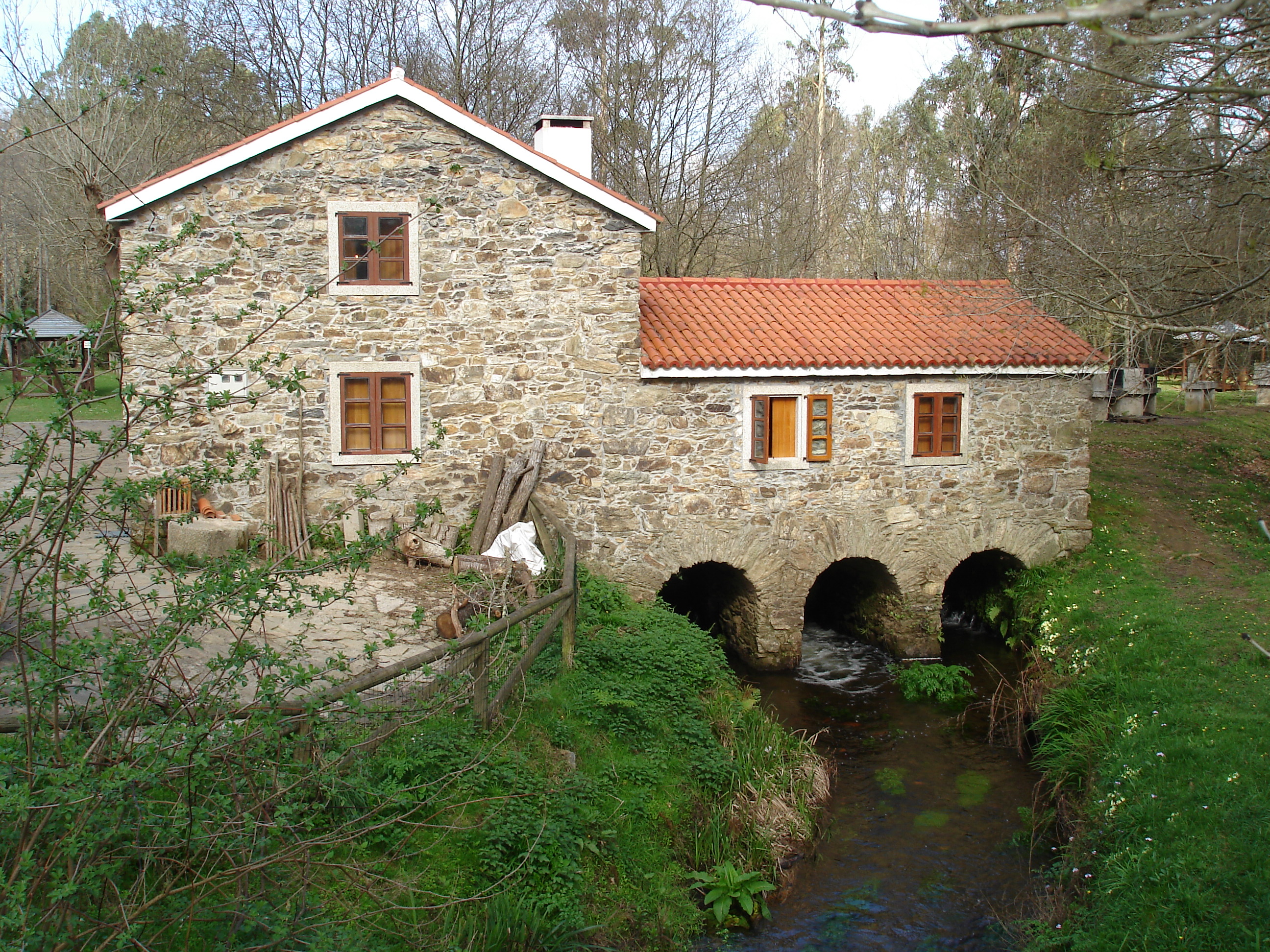 Muiño de Pedroso